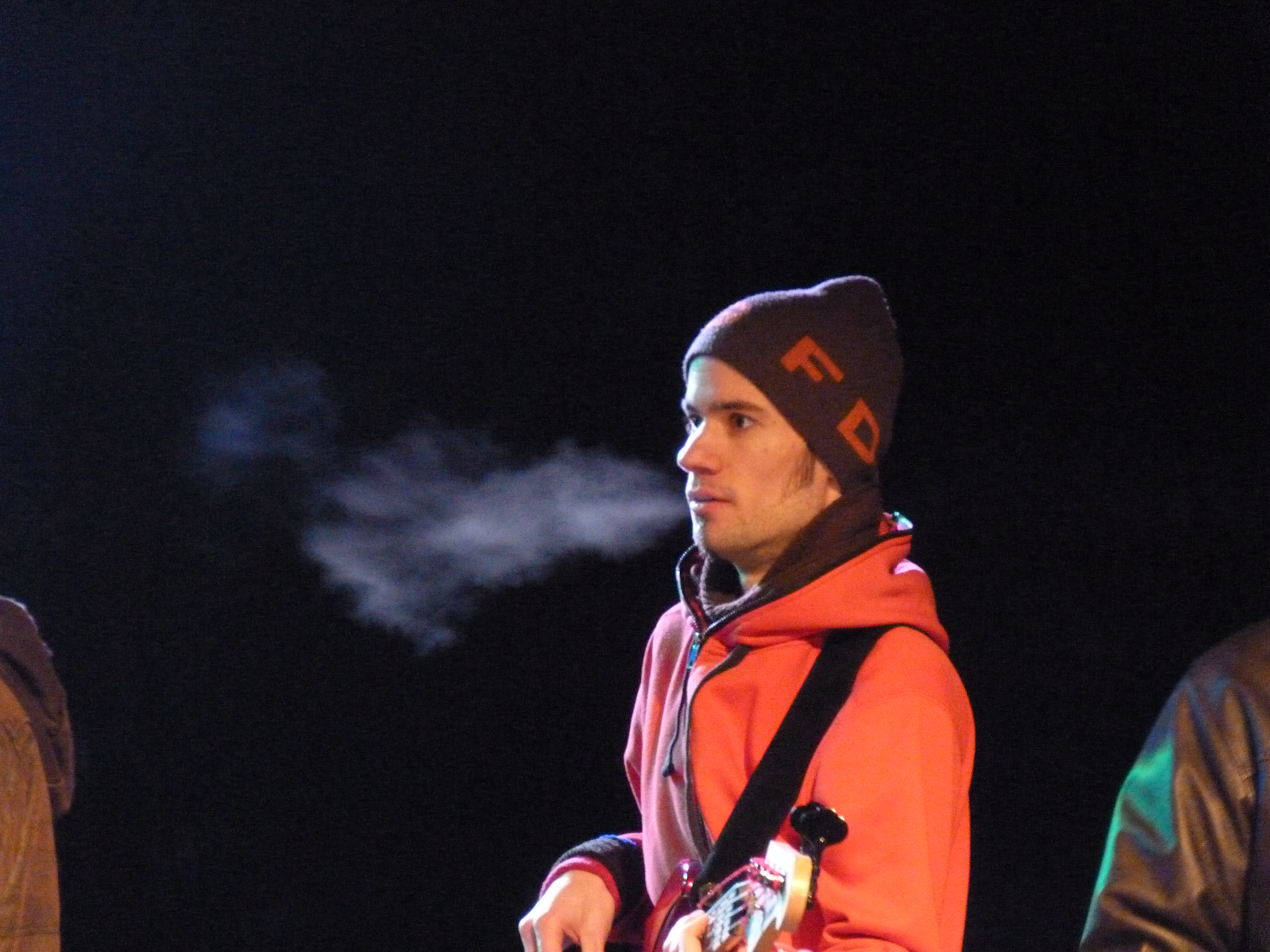 A felvétel 2015. február 7-én szombaton készült Miskolcon. Miskolci Kocsonyafesztivál. Milagro (Santana Tribute) együttes. Autó Színpad, Erzsébet tér. A zenekar tagjai: Csonka Zoltán gitár, Uzsorás Ádám ének, Kiss Imre dobok, Belicza András timbales, Bakó Árpád, basszusgitár, Radi Tamás billentyű, Monori János konga, ifj. Csonka Zoltán gitár. ©© Derzsi Elekes Andor, Budapest, 2015, A kép másolását, bármilyen úton történő sokszorosítását és felhasználását a szerző ellenérték nélkül, jogutódjaira is kihatóan megengedi. Az engedély kiterjed a kereskedelmi célú hasznosításra is. Kéri azonban nevének feltüntetését a felhasználás során. A Metapolisz sorozat valamennyi képe és filmje Creative Commons alatti valamint kereskedelmi - for profit - célra is felhasználható. Ajánlott hivatkozás: Derzsi Elekes Andor: Metapolisz DVD line Források